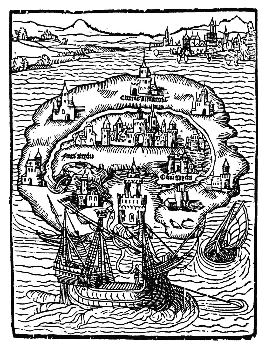 Titelholzschnitt aus Thomas Morus' Roman Utopia